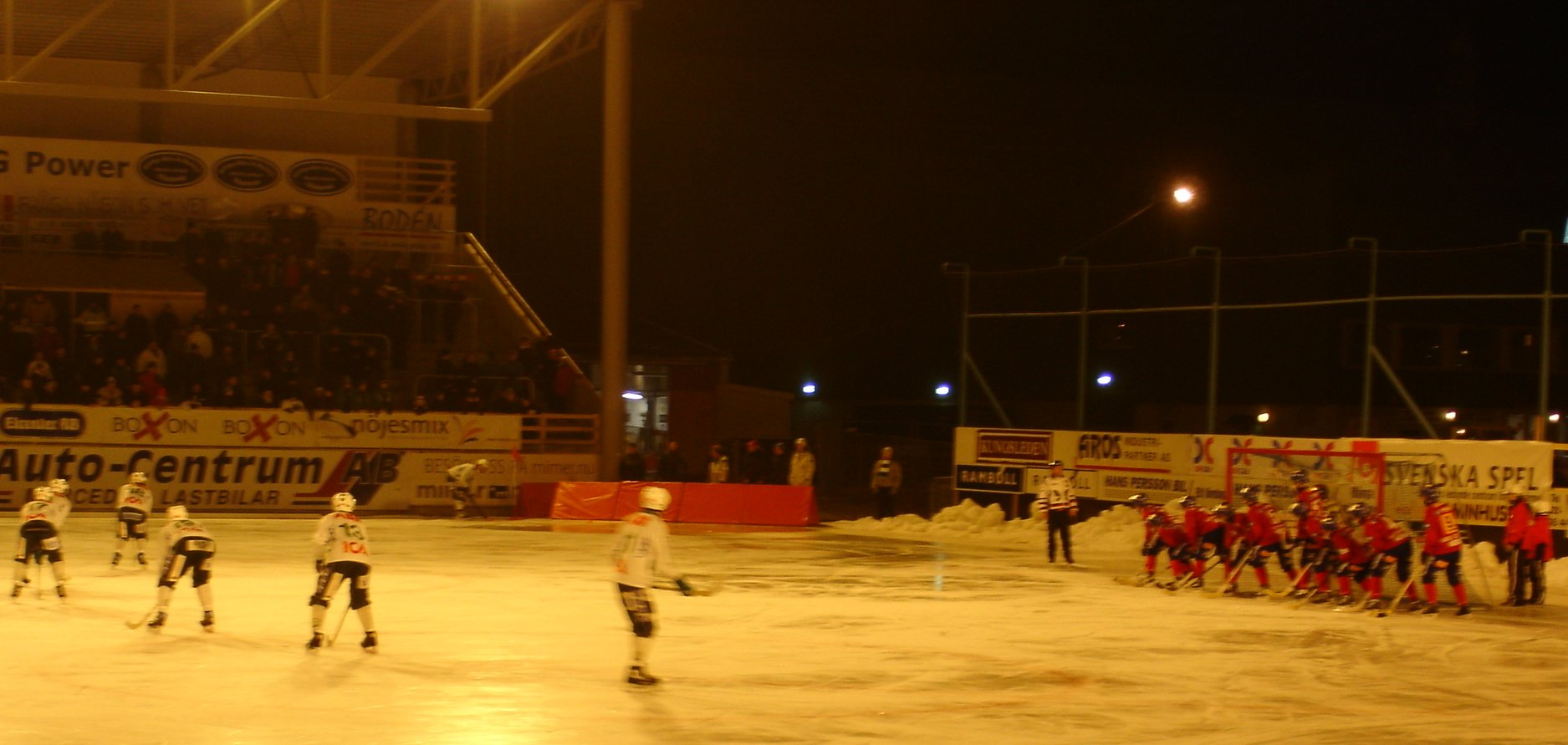 A corner shot is about to be delievered. Västerås SK playing Edsbyns IF at Rocklunda, Västerås.